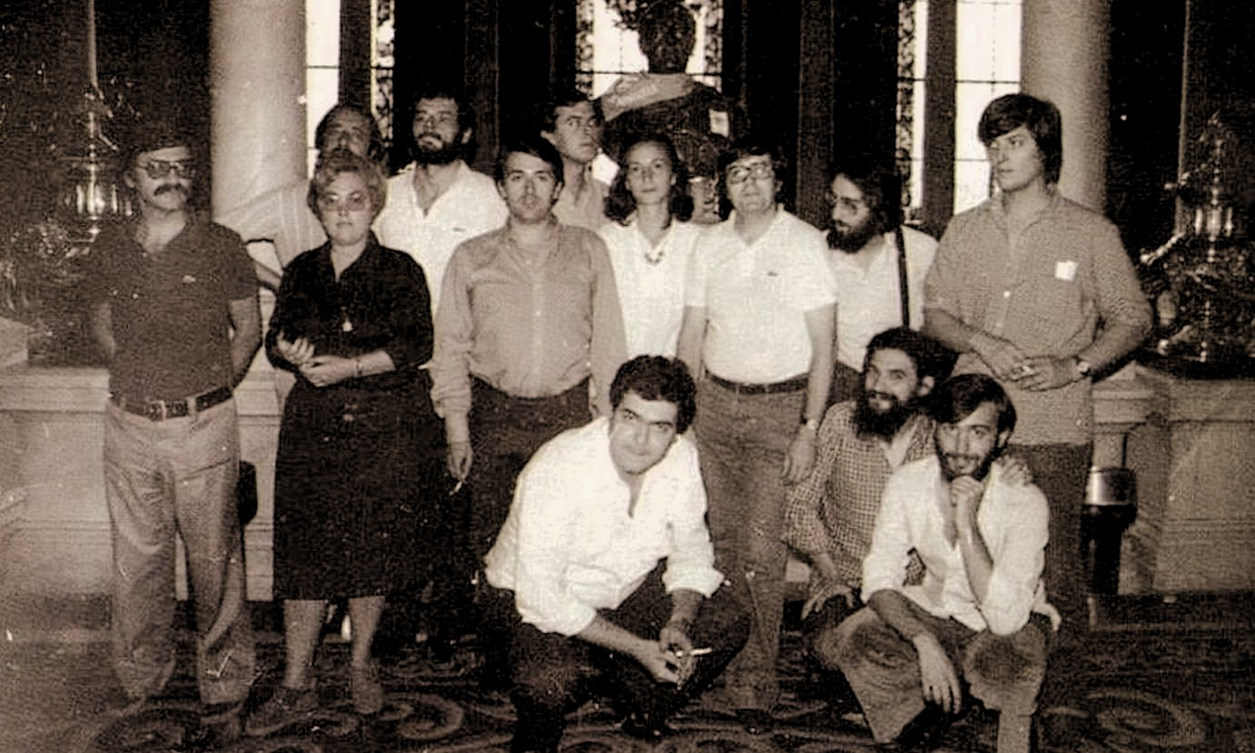 1978ko Aste Nagusiko jai-batzordea Bilboko udaletxean.